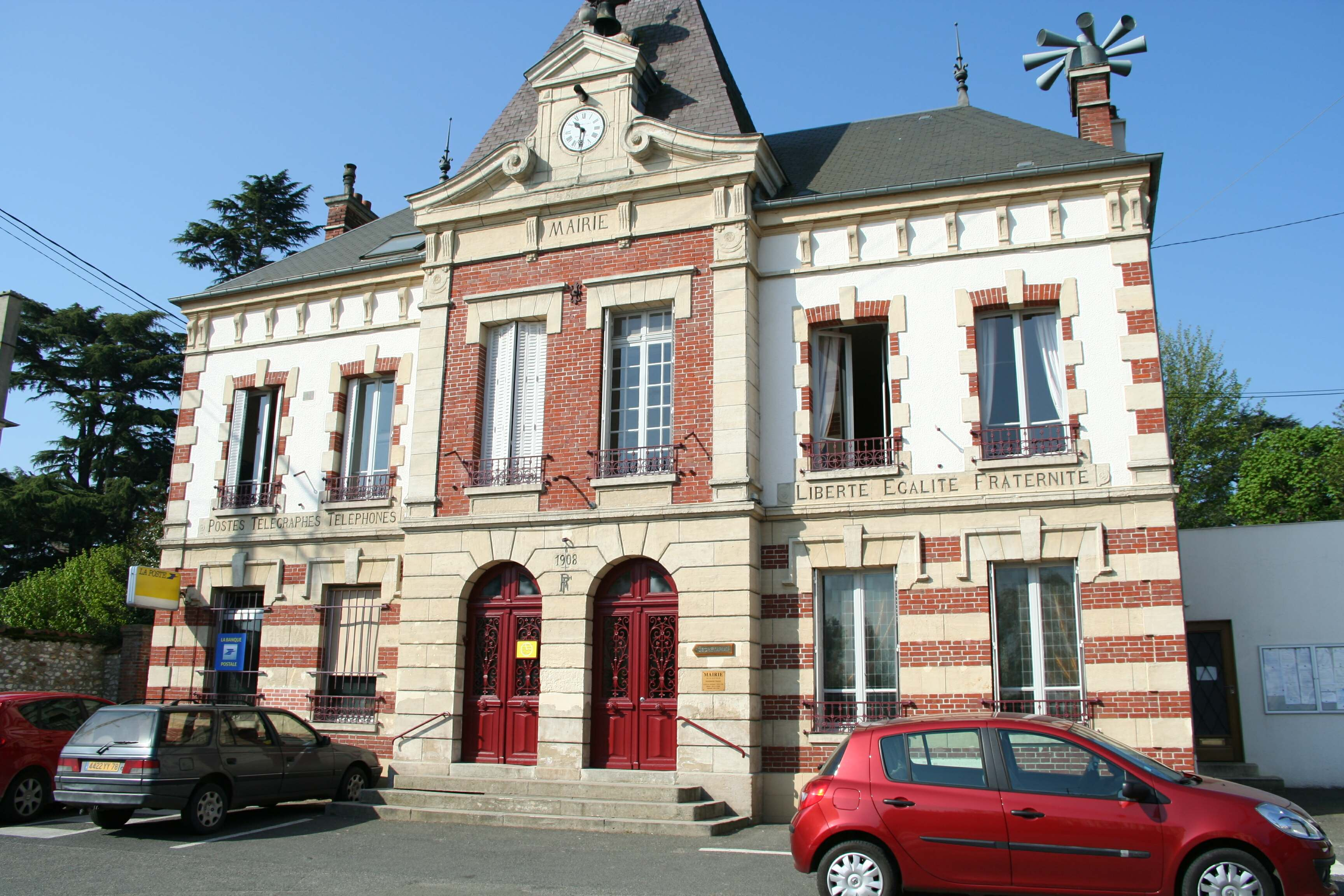 Mairie de Bréval - Yvelines (France)